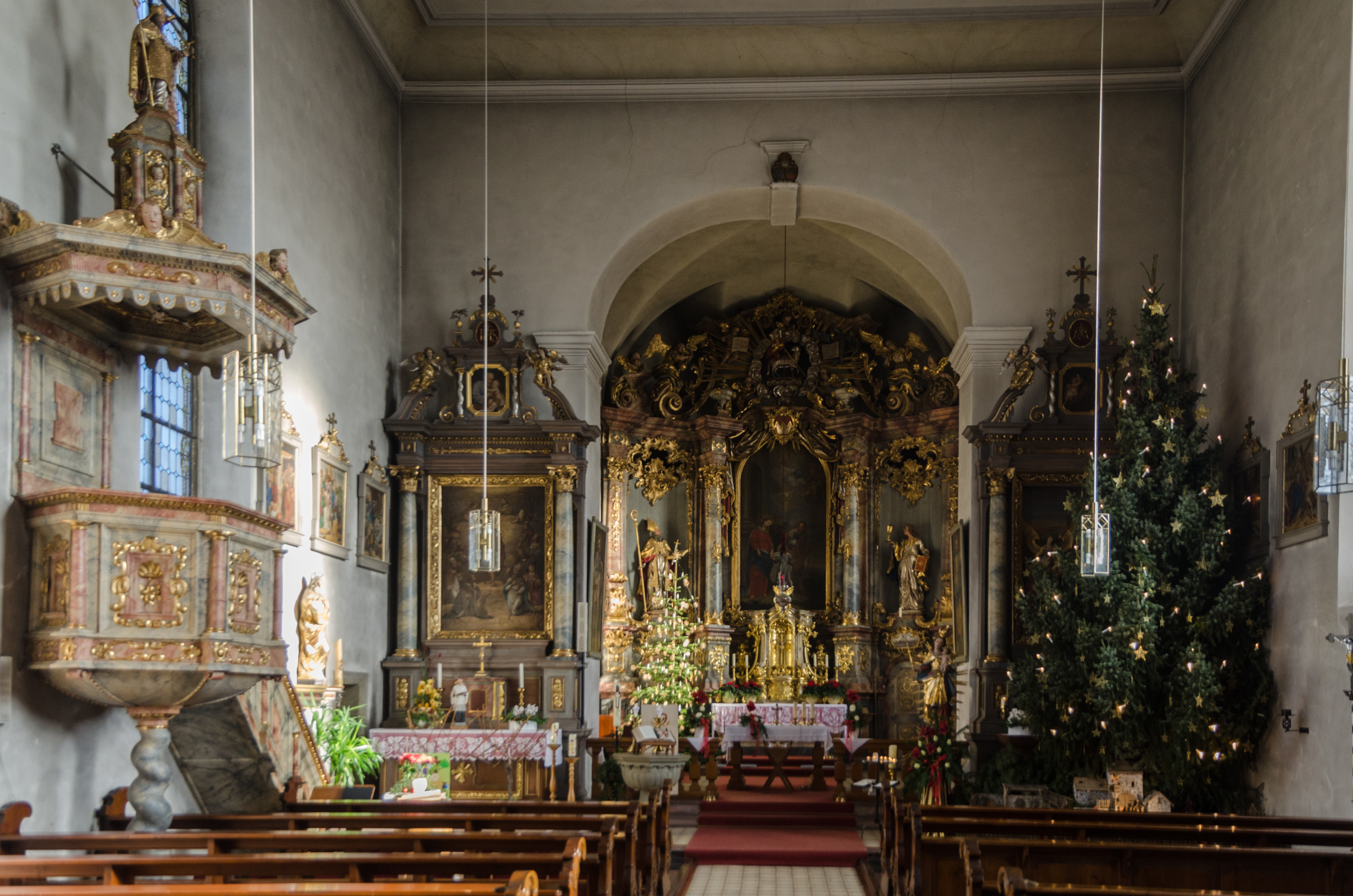 Eußenheim, Aschfeld, Katholische Pfarrkirche St. Bonifatius, innen